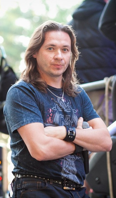 Фестиваль - воздух 2013г.